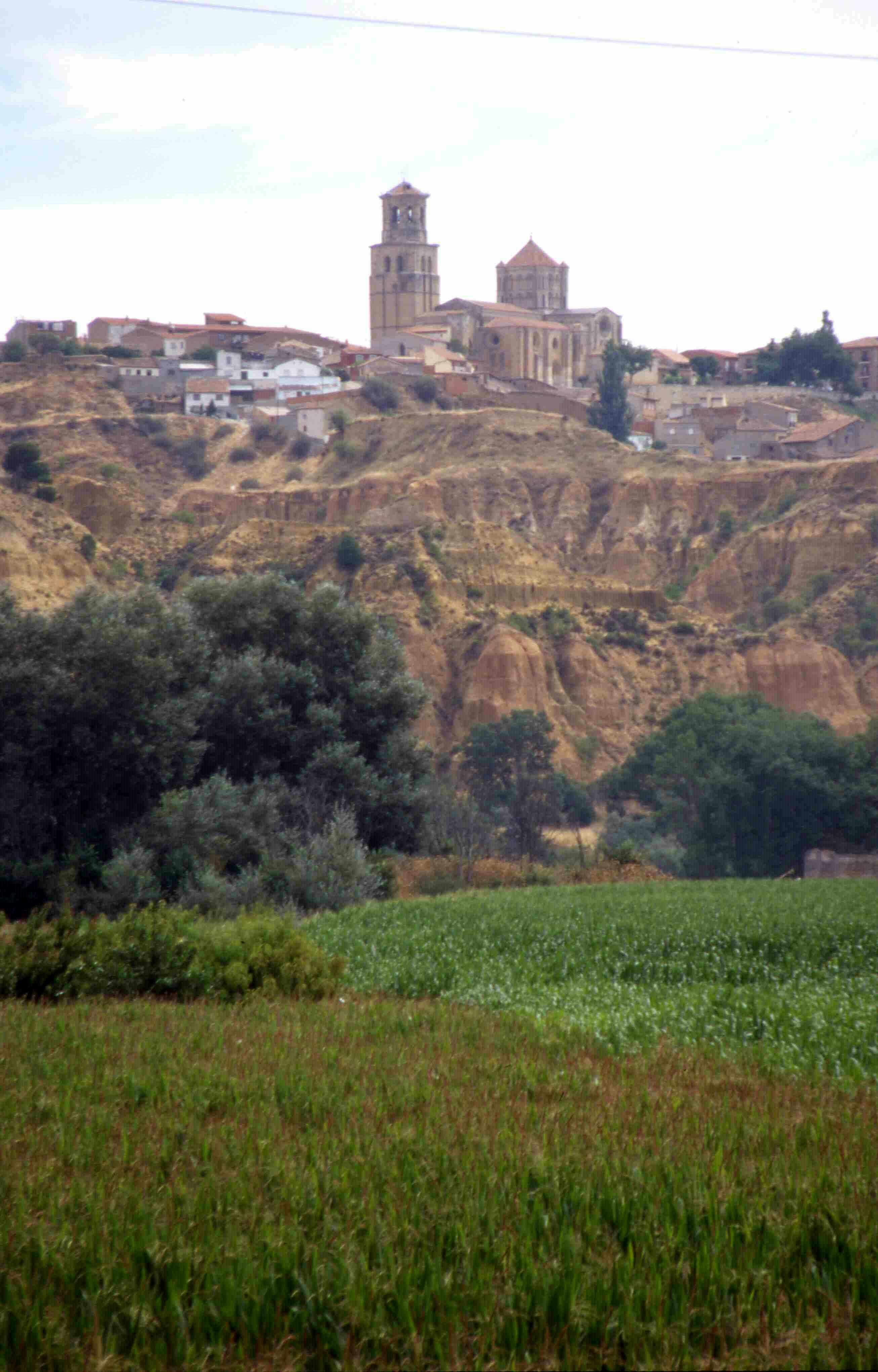 Toro Ansicht 1